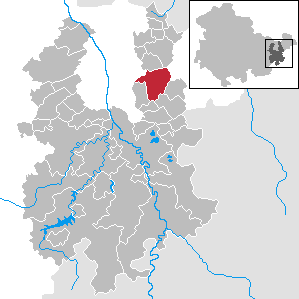 Ronneburg in Thuringia - District Greiz